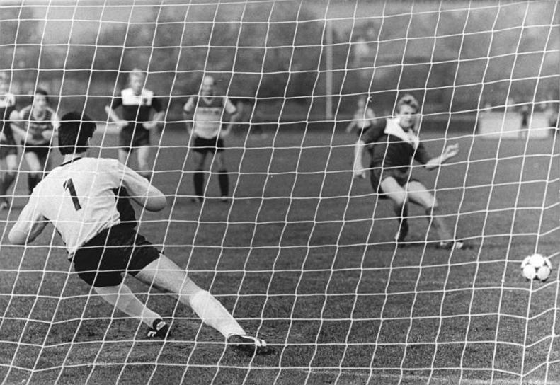 ADN-ZB-Hirndorf 11-10-86-ba-Erfurt: 1. Hauptrunde im FDGBlpokal-Robotron Sömmerda - 1. FC Lok Leipzig- Mit einem verwandelten Foul-Elfmeter erzielte der Leipziger Uwe Zötzsche das 1:0 für den Pokalverteidiger, der sich am Ende mit einem 3:0 Sieg für die nächste Runde qualifizierte.